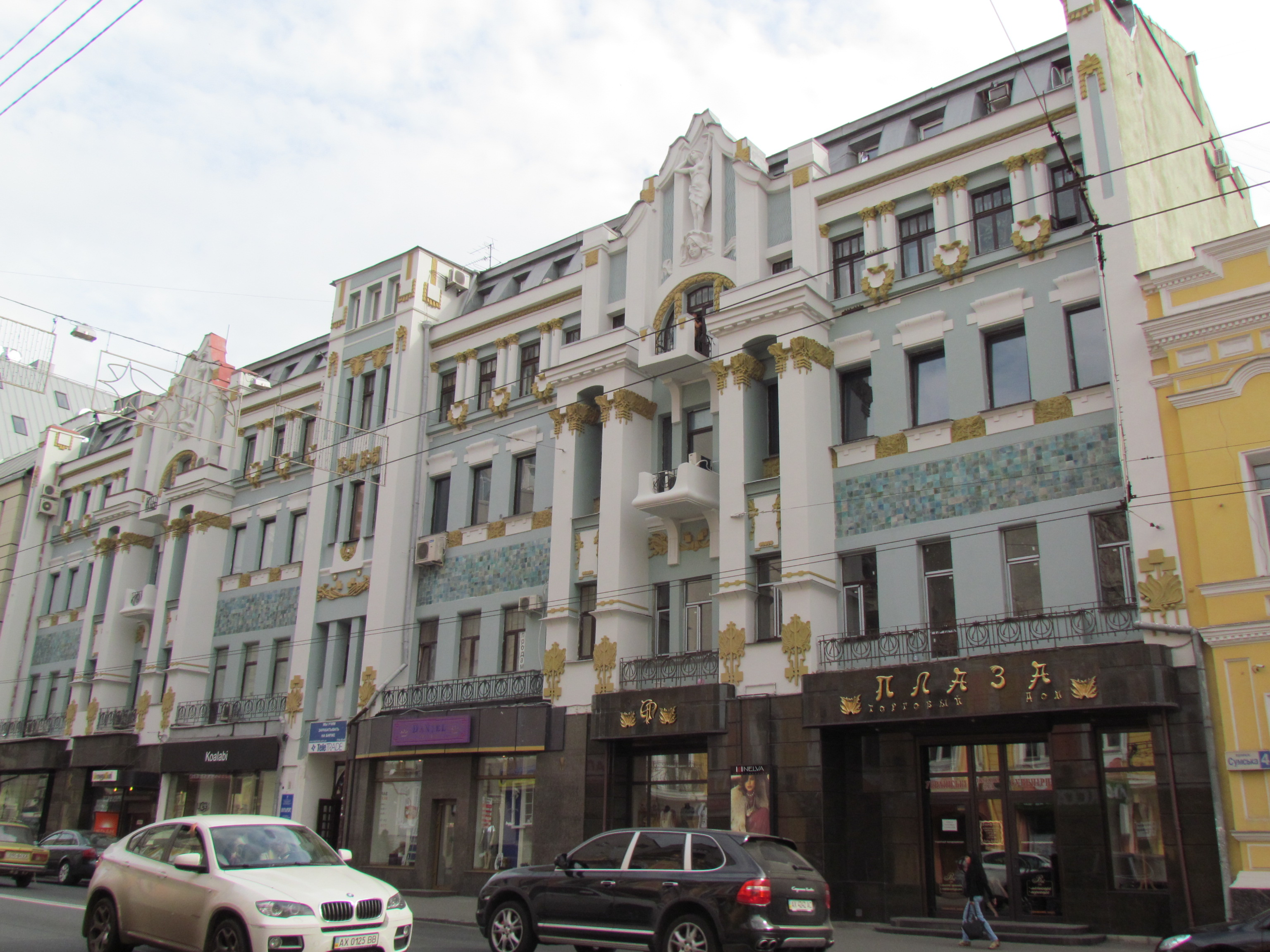 Україна, Харків, вул. Сумська, 6